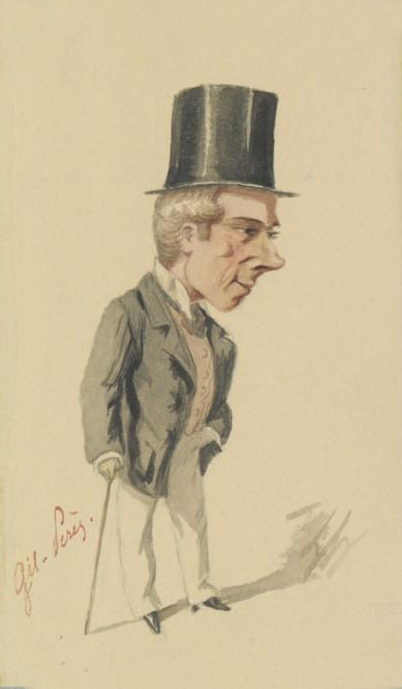 Les trois fils de Cadet-Roussel, comédie de Delaporte, Varin et Laurencin : portrait de Gil-Perès : dans le rôle de Cascaro